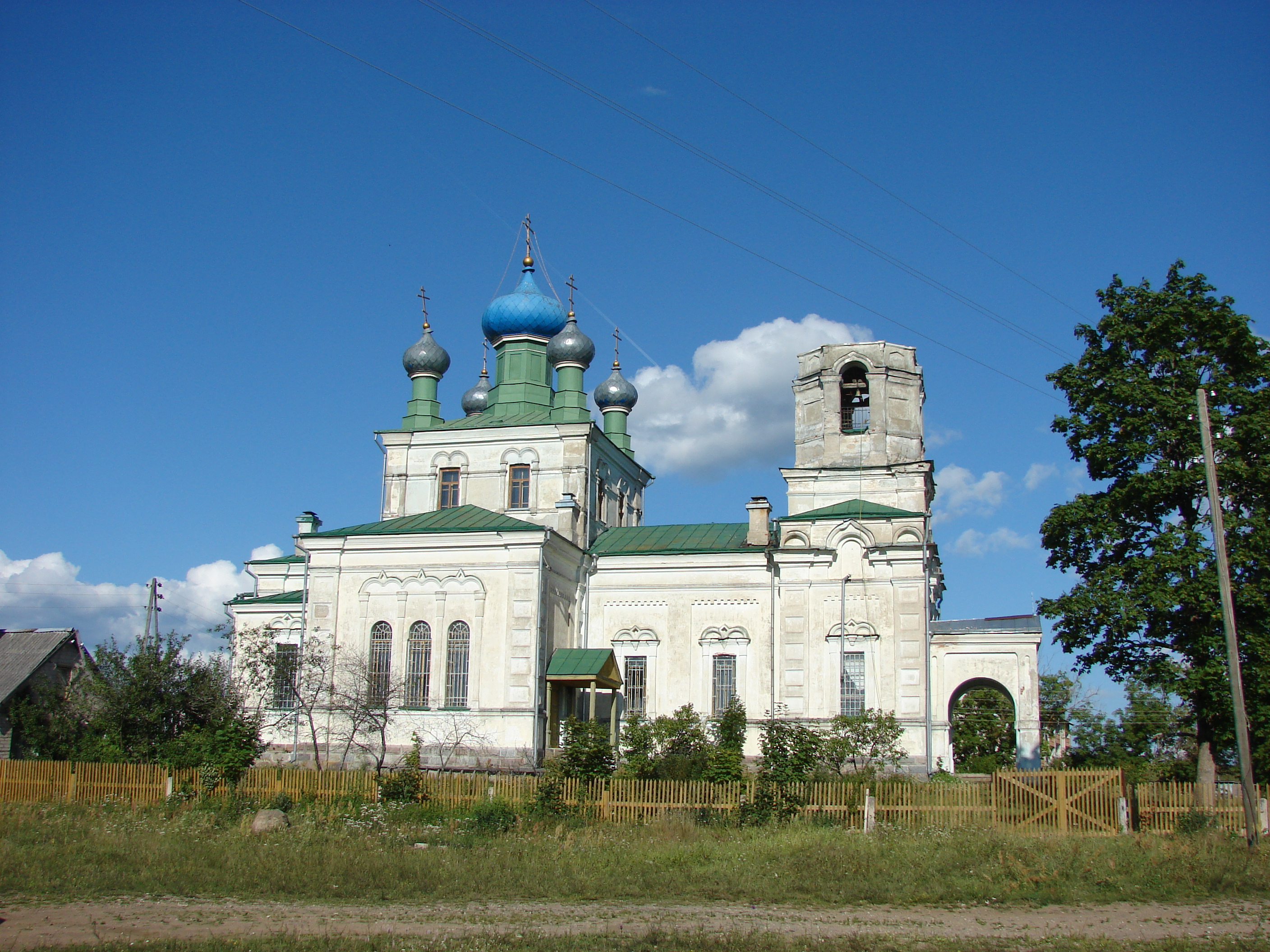 Vecslabadas Kristus Augšāmcelšanās pareizticīgo baznīca (1908.), Istras pagasts, Ludzas novads, Latvia